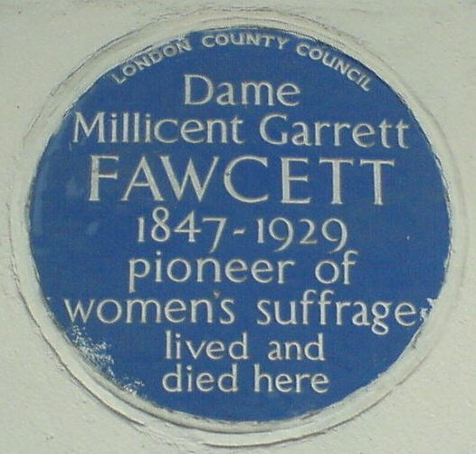 Dame Millicent Garrett Fawcett